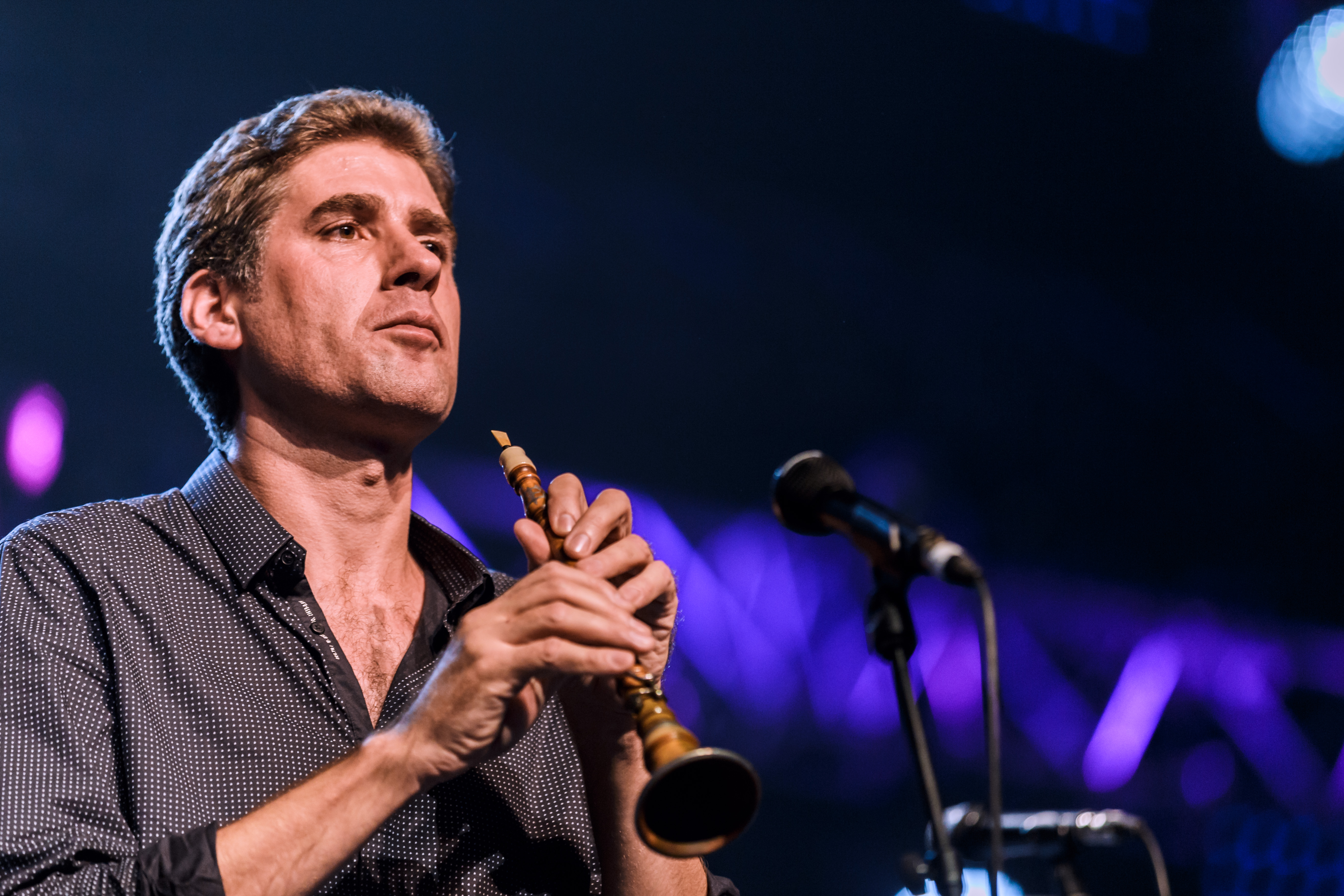 Création du duo Hamon Martin avec l'Orchestre Symphonique de Bretagne à l'occasion du grand fest-noz du festival Yaouank le 19 novembre 2016 au MusikHall du Parc Expo de Rennes.